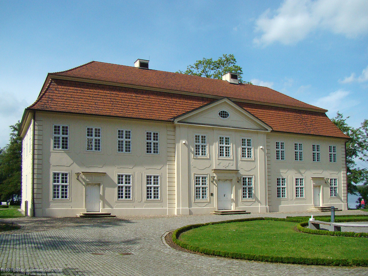 Kavaliersbau beim Schloss in Mirow